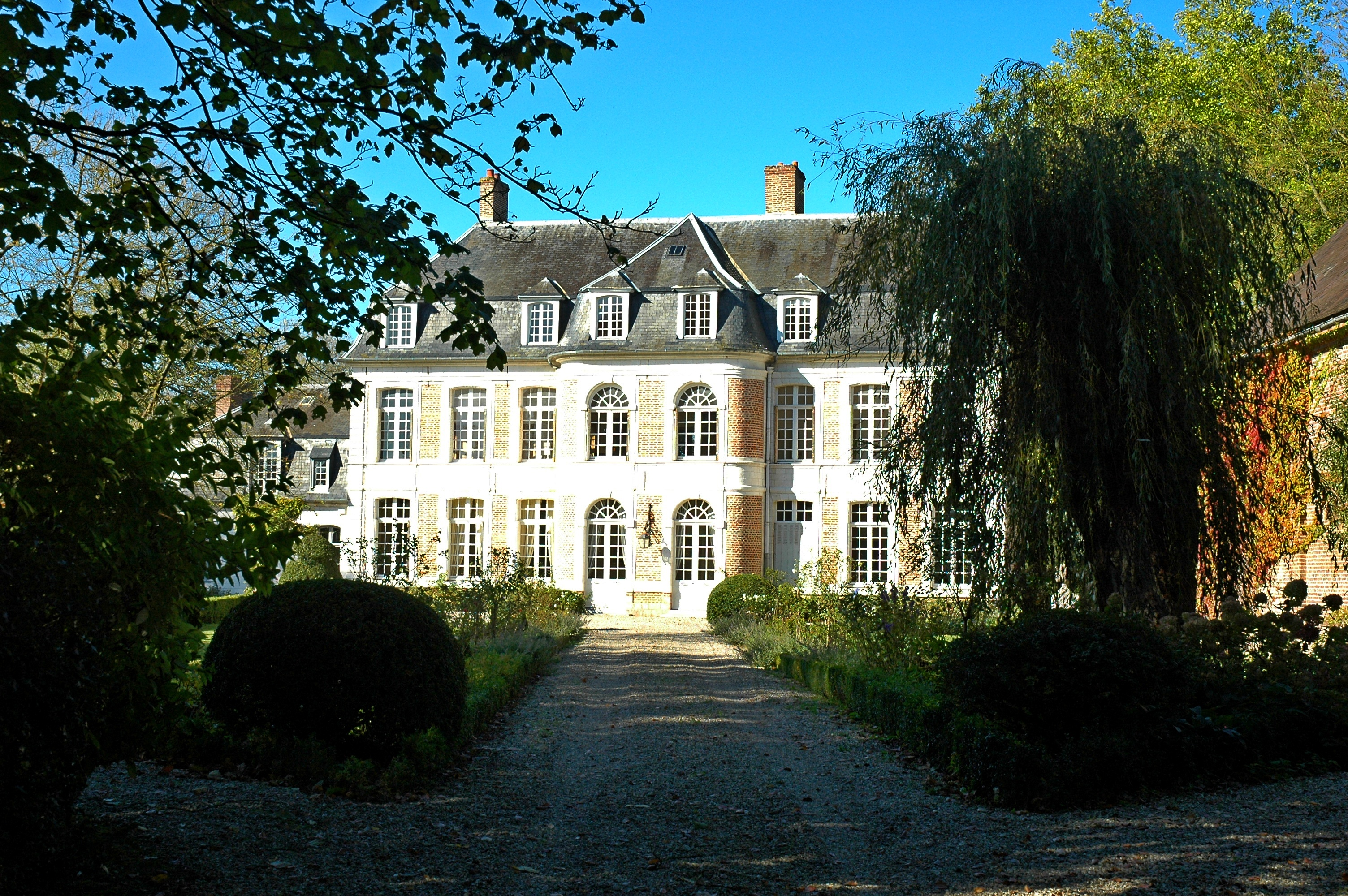 Dompierre-sur-Authie (Somme, France). Le château.